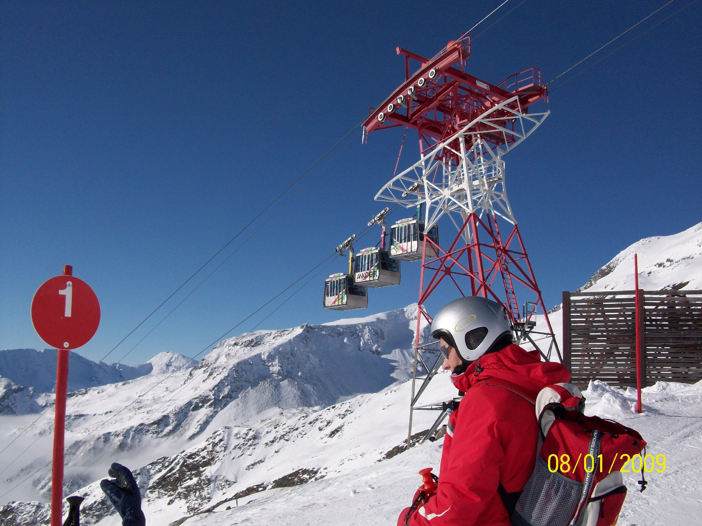 Ankogel-Skigebiet mit Seilbahn, oberhalb Mallnitz